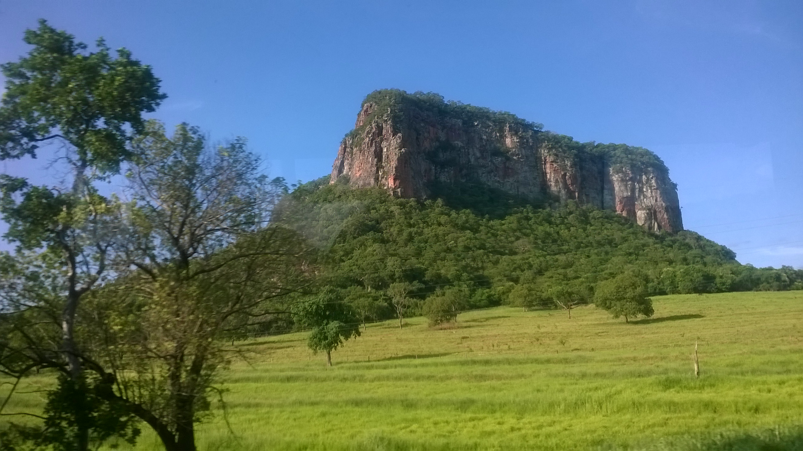 Montanha à caminho de Aquidauana